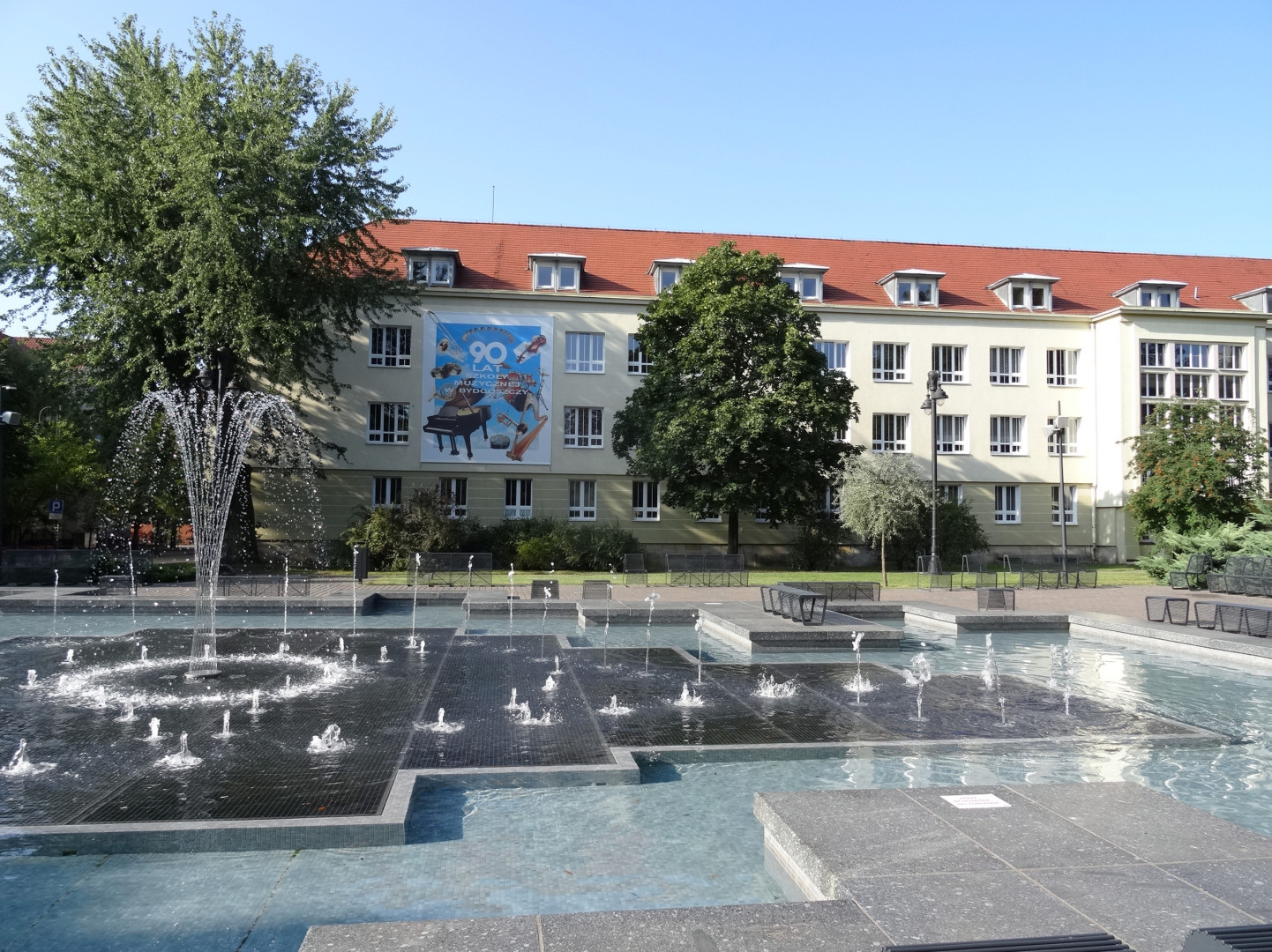 Zespół Szkół Muzycznych im. Artura Rubinsteina w Bydgoszczy, ul. Szwalbego 1, przed szkołą fontanna multimedialna